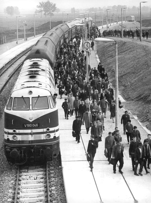 Halle, Neustadt, Bahnhof, Zug ADN-Zentralbild Sturm 9.6.67 Halle-Neustadt Vom Werden einer neuen Stadt Im Mai 1967 wurde mit Errichtung eines provisorischen Bahnhofes eine Eisenhahn-Schnellverbindung von Halle-Neustadt zu den Großbetrieben Buna und Leuna in Betrieb genommen, die die Wartezeiten auf 10 bzw. 20 Minuten verkürzt. Die jetzt in Halle-Neustadt wohnenden Chemiearbeiter waren vorher in den umliegenden Dörfern zu Hause und benötigten durchschnittlich 60 bis 100 Minuten für den Weg zur Arbeitsstelle. Der innerstädtische Verkehr in Halle-Neustadt wird durch Omnibuslinien, die zur Bezirkshauptstadt Halle führen, bewältigt. Die einzelnen Wohnkomplexe, die insgesamt etwa 6 Quadratkilometer Grundfläche ausmachen, sind so projektiert, dass in diesen Bereichen keine Verkehrsmittel erforderlich sind.